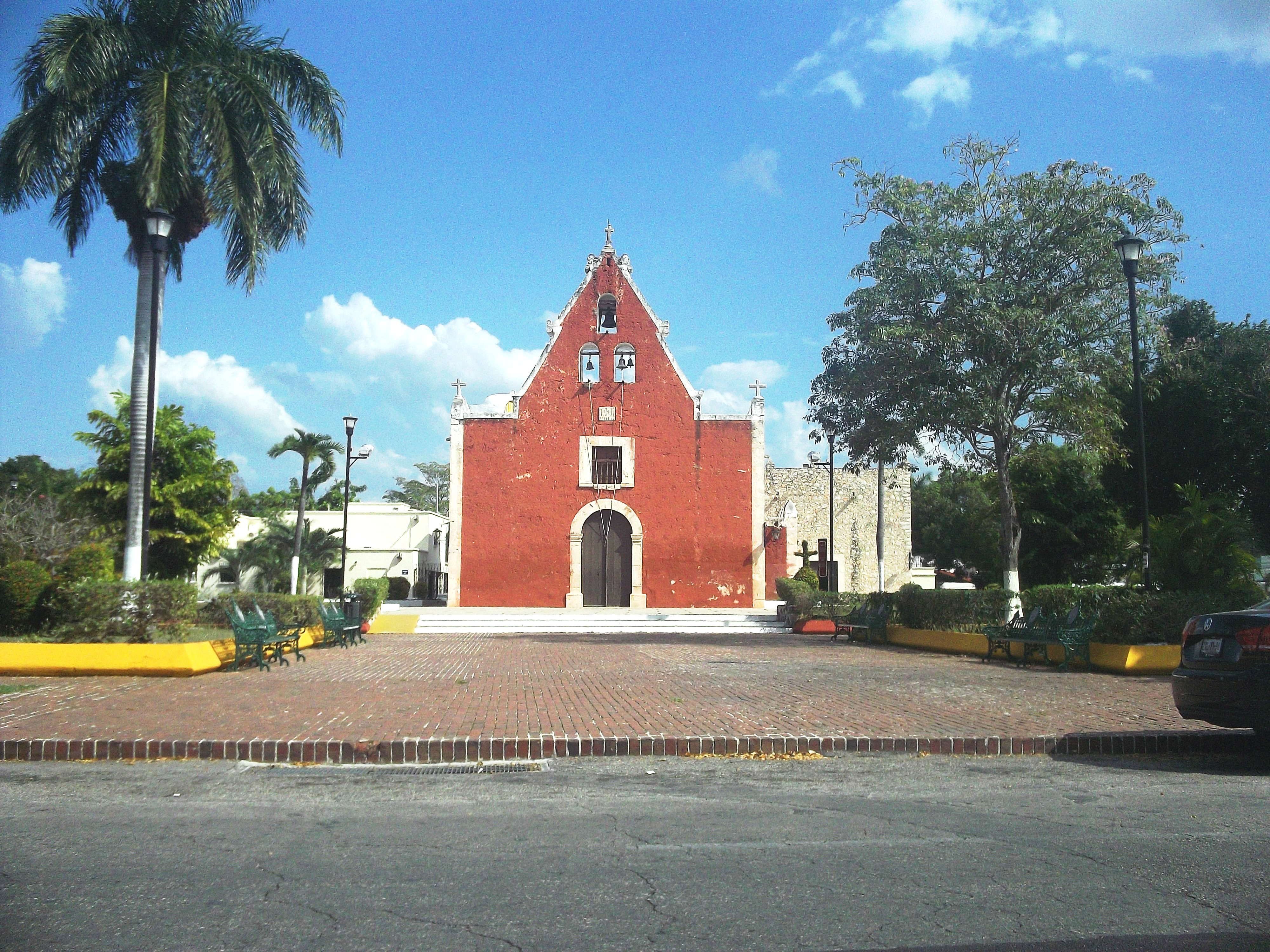 Iglesia principal de la colonia Itzimná en Mérida, Yucatán.